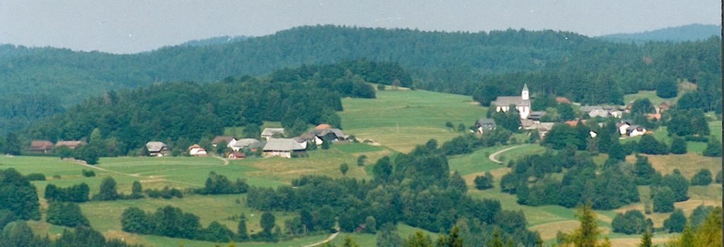 Description: Urberg from Höchenschwand